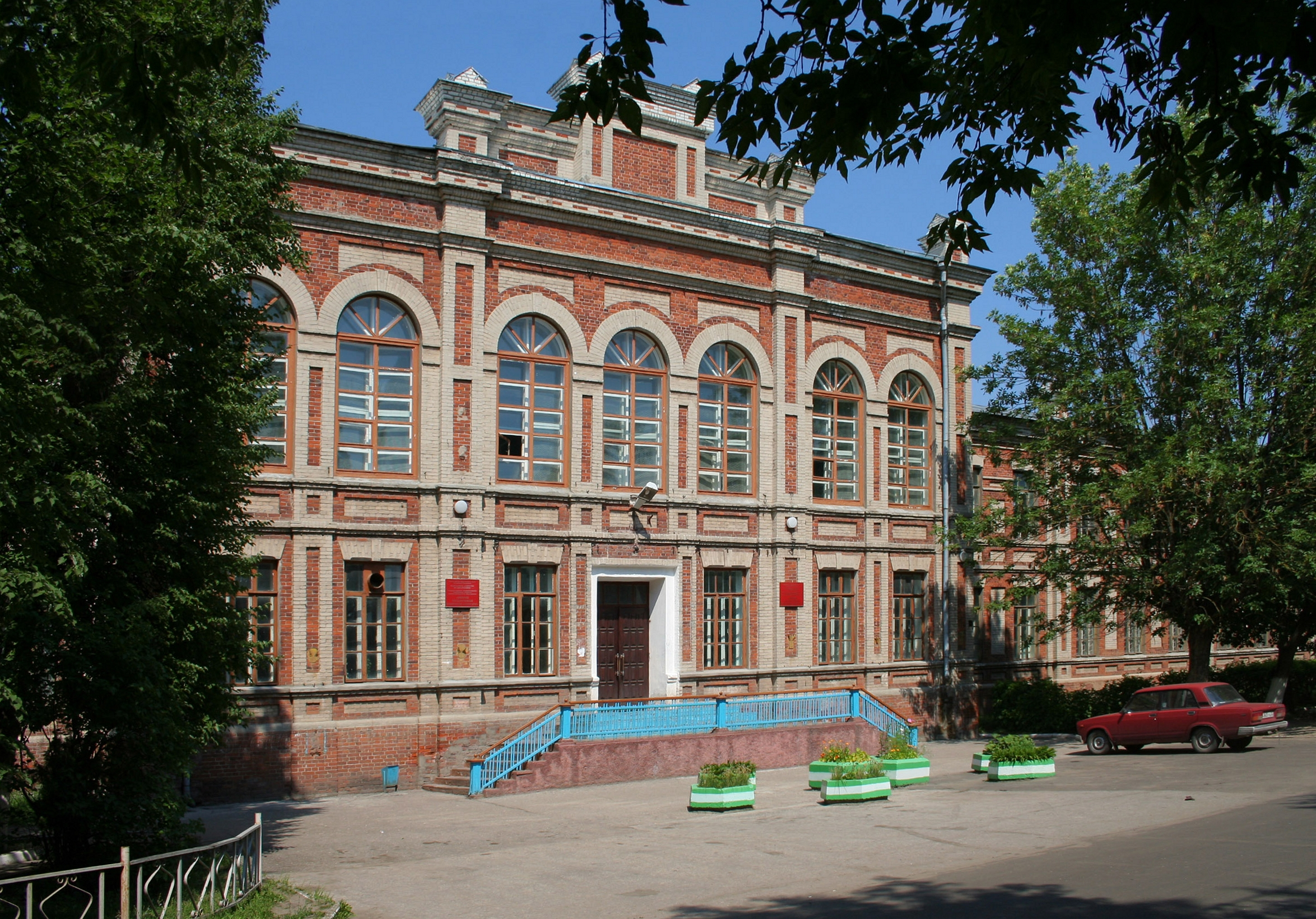 Старый корпус БГТУ, Брянск